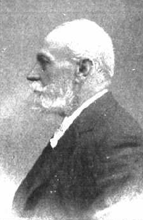 Fotografía del político español Hermenegildo Giner de los Ríos publicada en 1913 con motivo de la concesión del indulto a ocho sentenciados a muerte gracias a sus gestiones